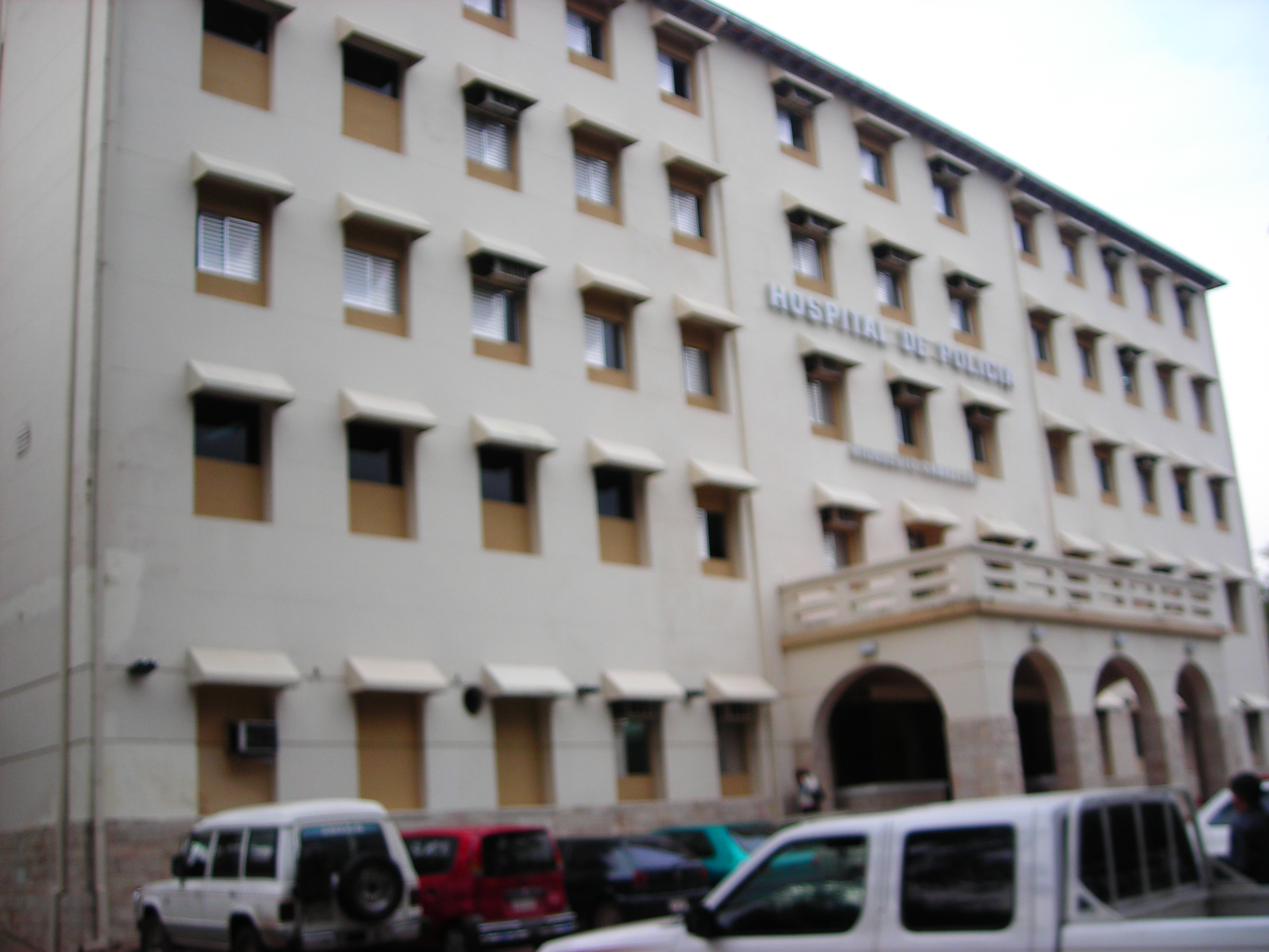 policlinico